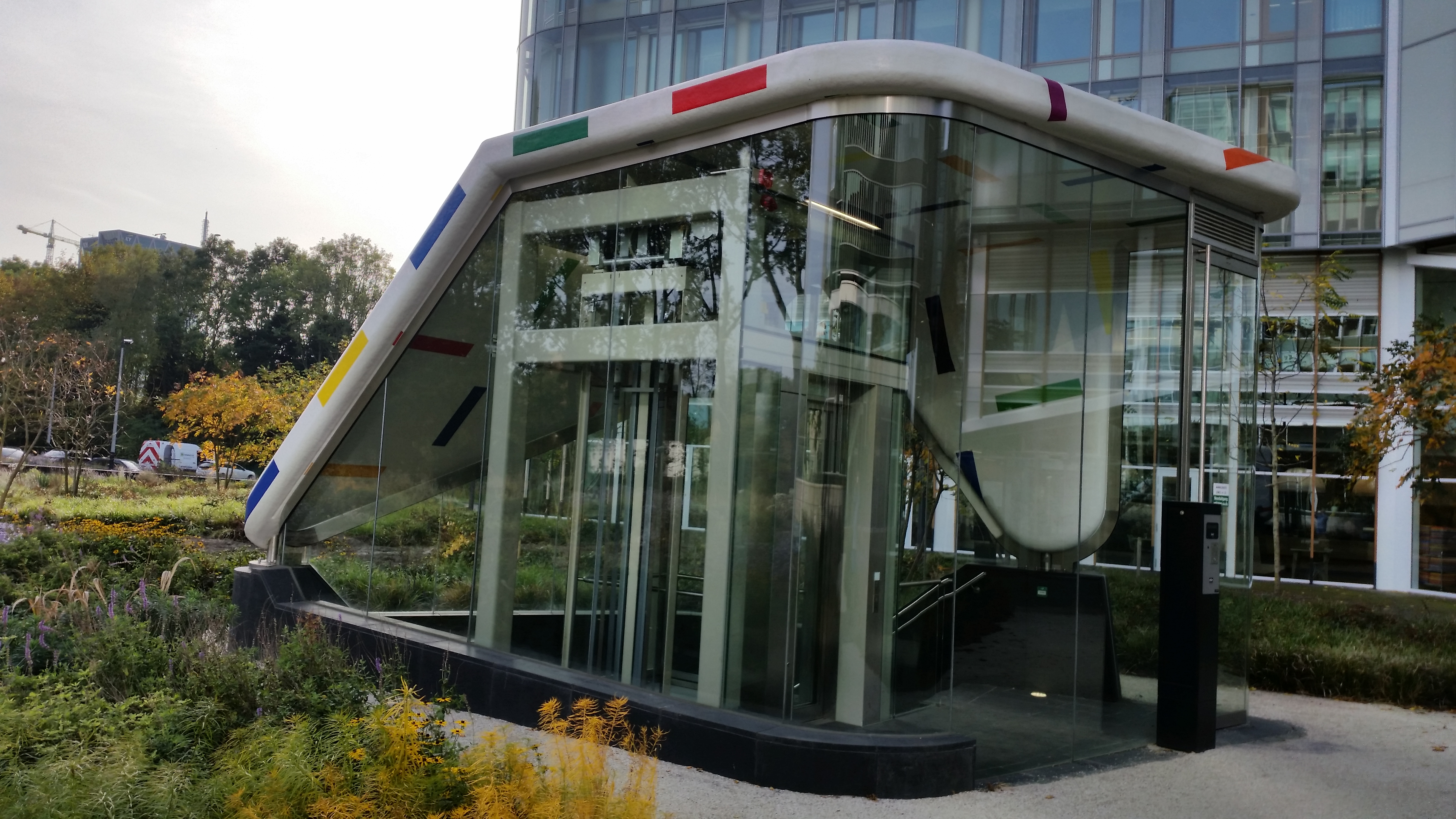 Een kunstwerk van Steven Aalders vormt het dak van een liftschacht naar de ondergrondse parkeergarage van Stibbe; Beethovenplein/Beatrixpark, Amsterdam-Zuid